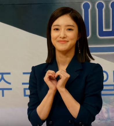 18일 오후 서울시 양천구 목동 SBS에서 SBS 새 금토드라마 '의사 요한' 제작발표회가 열려 배우 지성X이세영X이규형X황희X정민아X김혜은X신동미가 참석해 개별 포토타임을 갖고 있다.